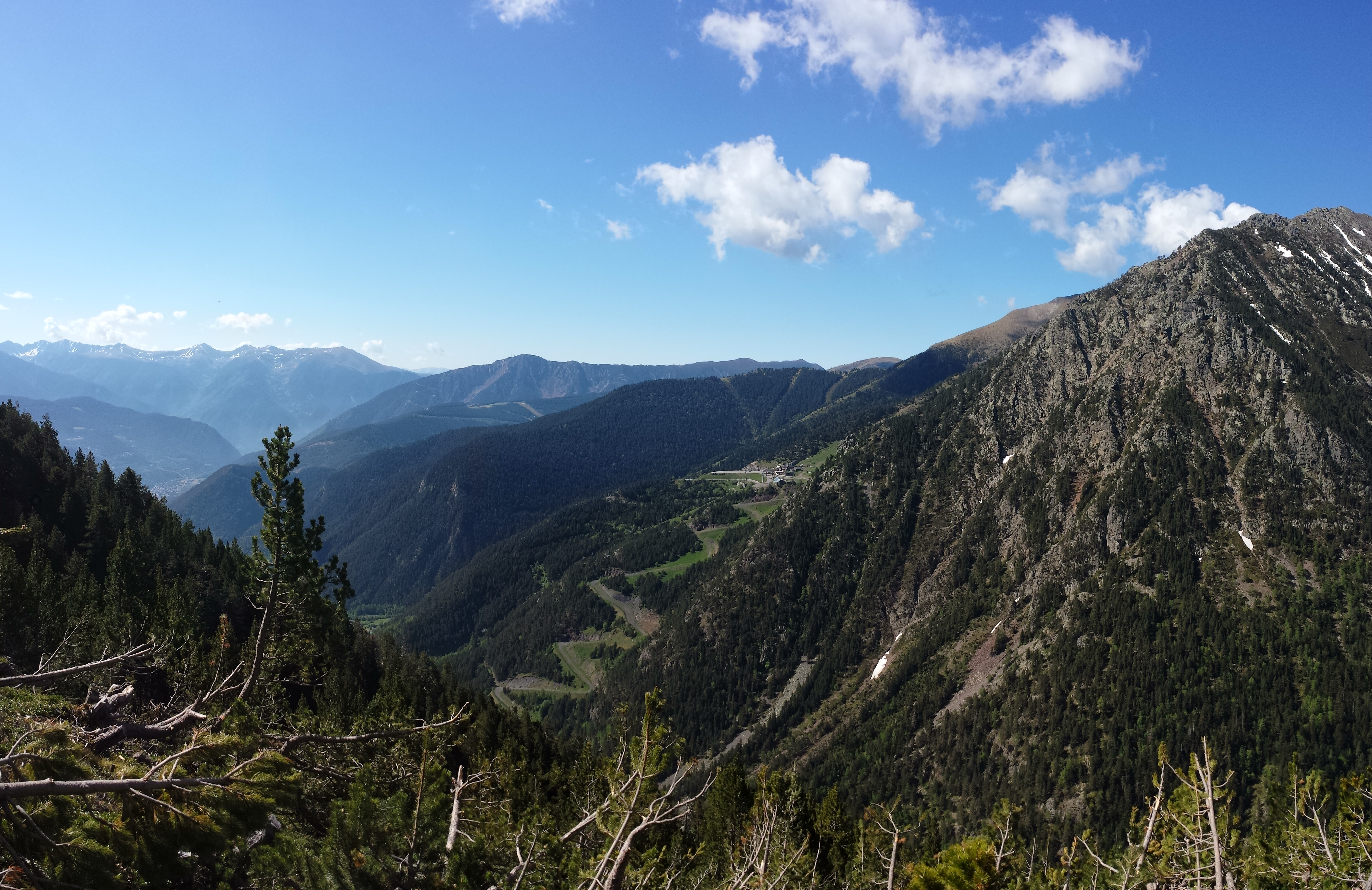 Valls del Comapedrosa (la Massana) This is a a photo of a natural area in Andorra with id: AD-PNCVC